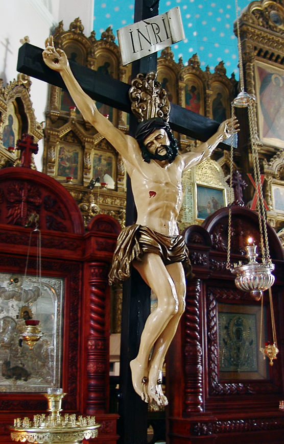 Распятие